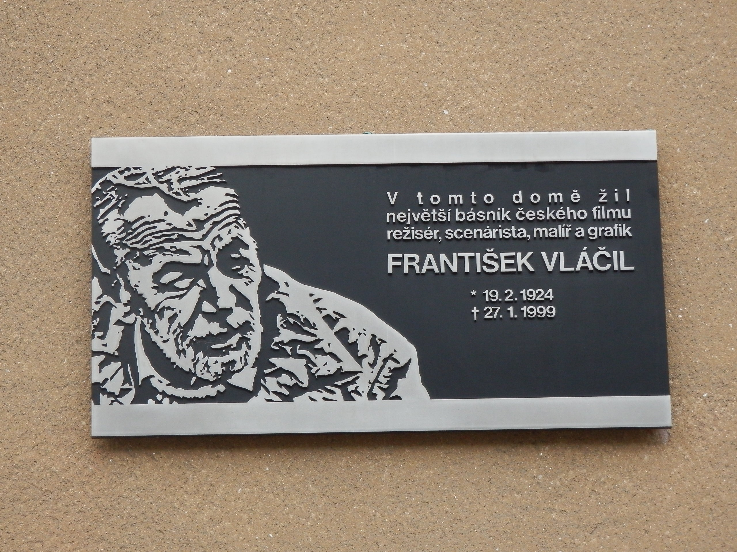 Pamětní deska na domě v Praze 6, Čínská 748/5.